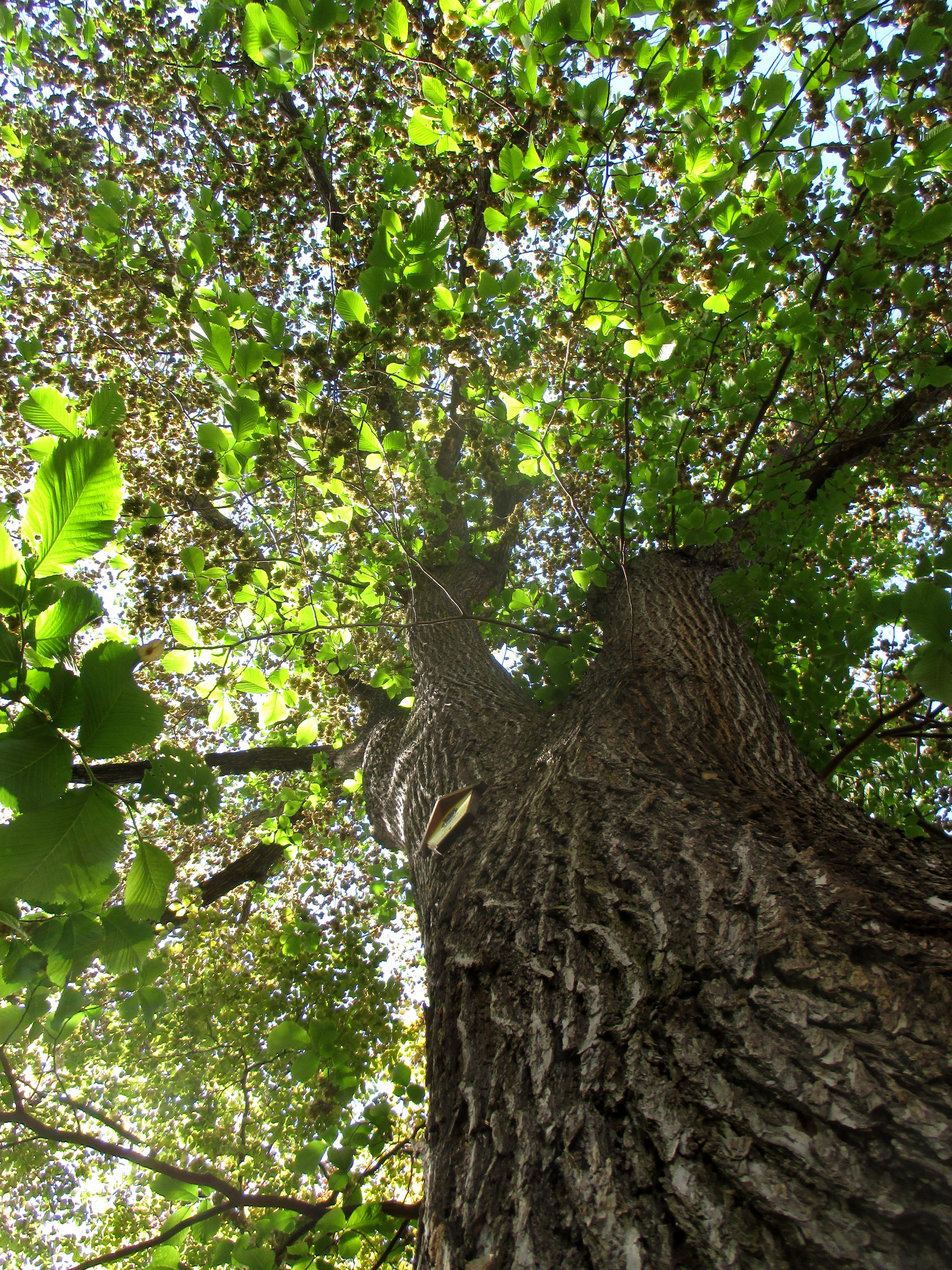 Alte Bergulme in Gotha.